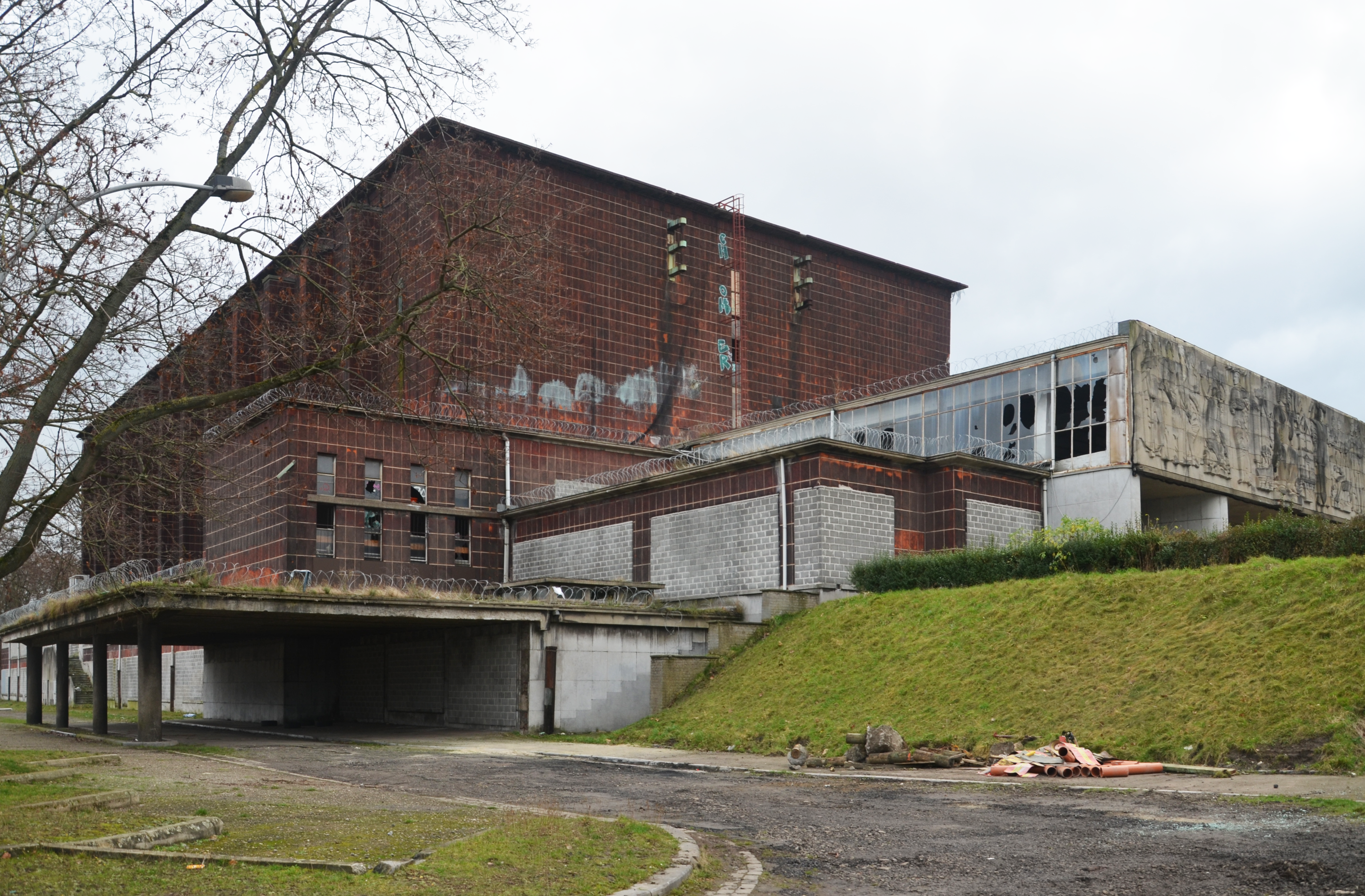 Vue du Palaois permanent de la ville de Liège